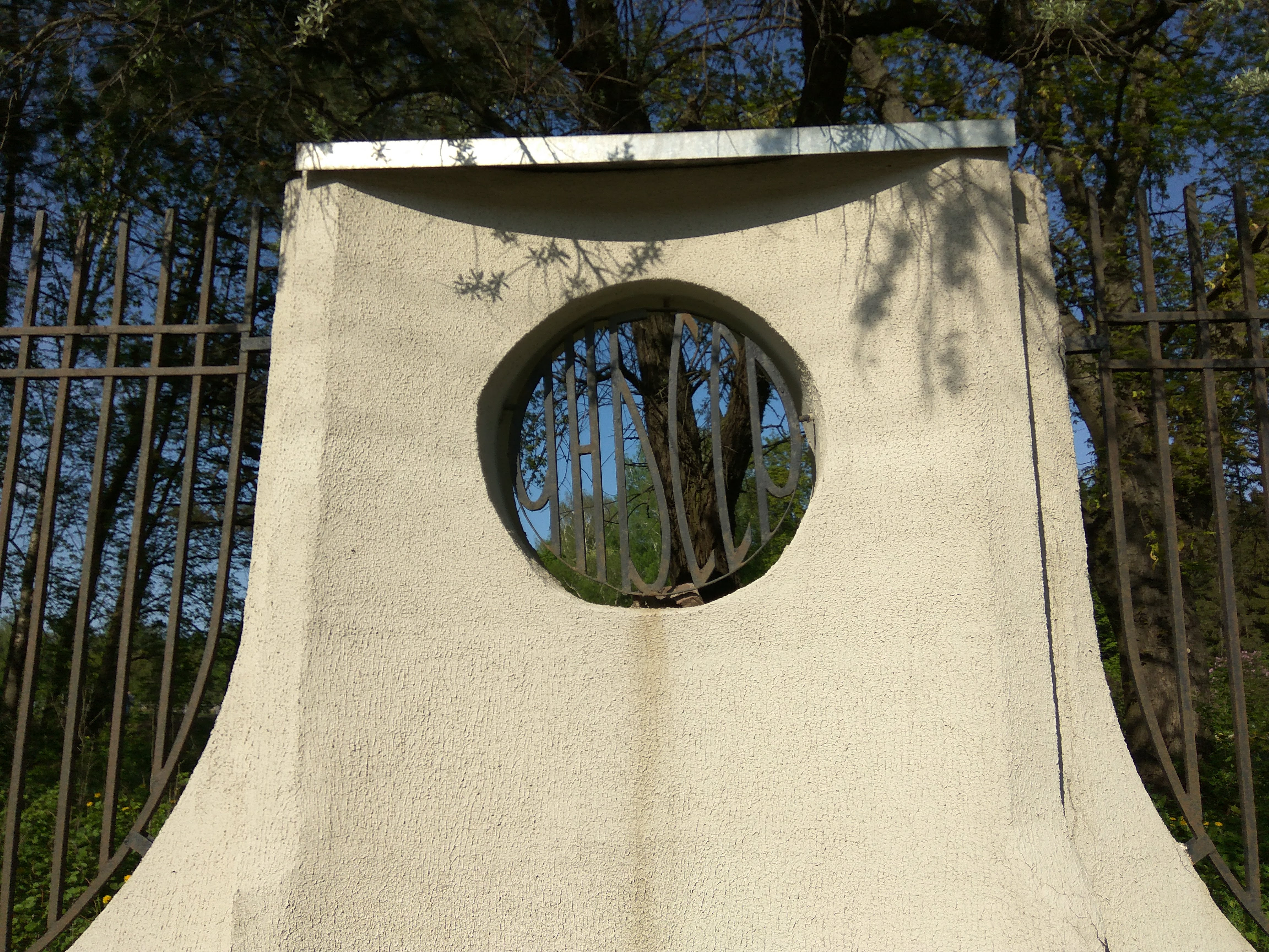 Мінск. Батанічны сад у маі 2018